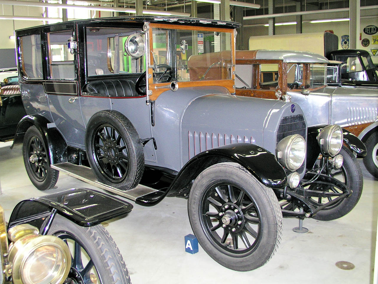 2.7-litre 4-cylinder car based on a prewar design, made in Belgium by Fabrique Nationale d'Armes de Guerre; right front-side view